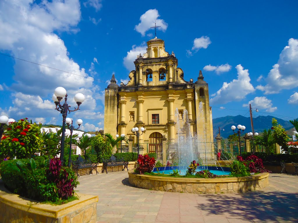 Vista de la Iglesia Católica y parque central